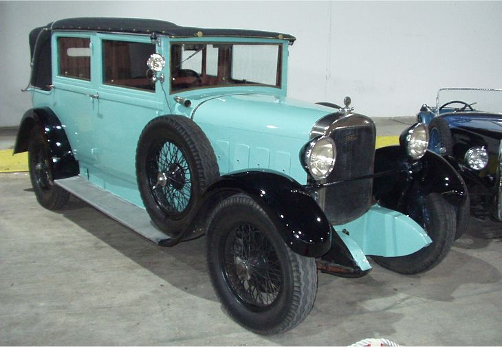 Walter P III (1926)